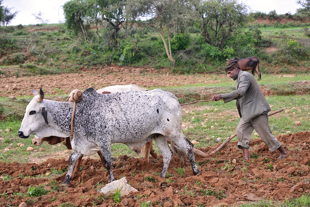 Ethiopia